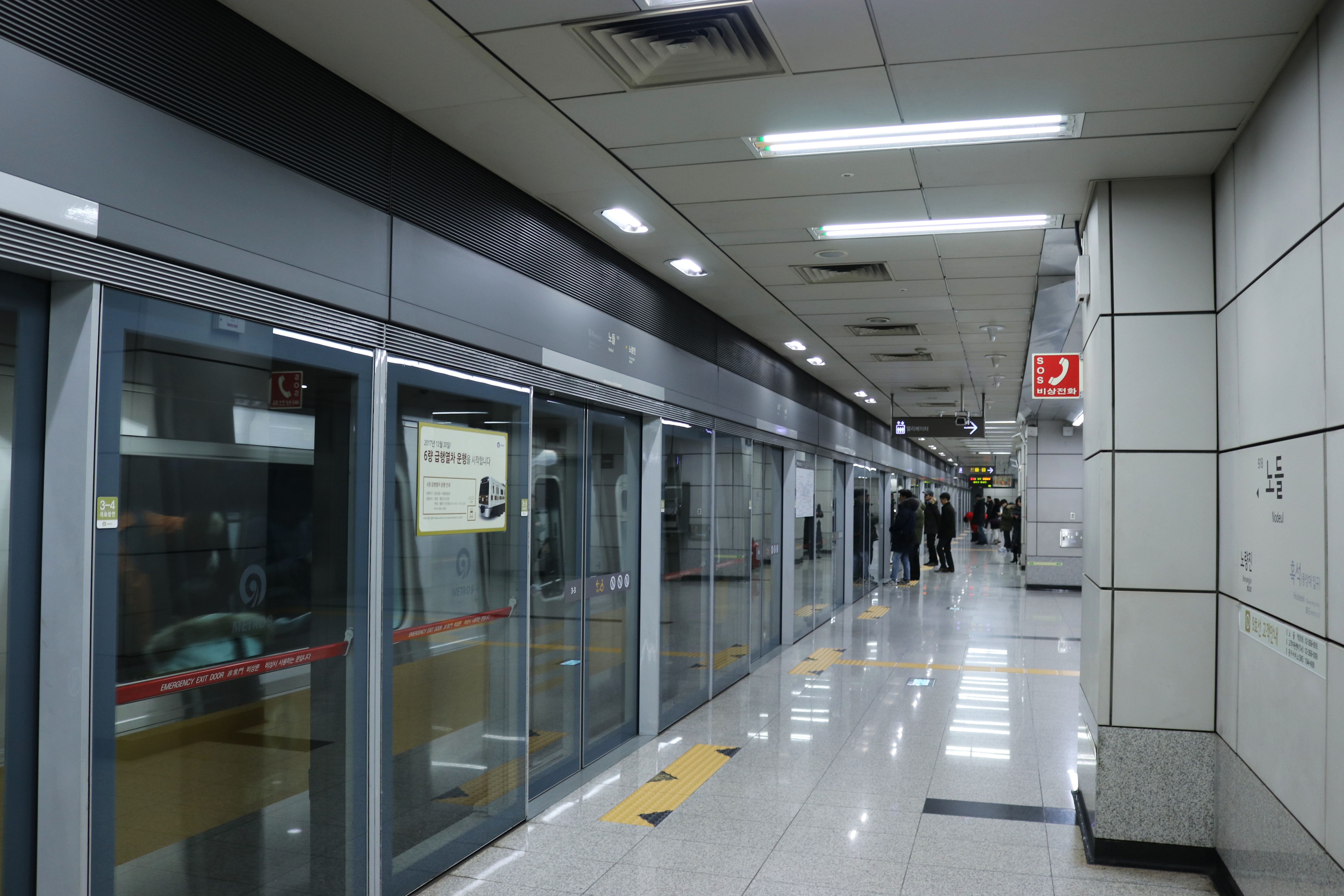 노들역 승강장